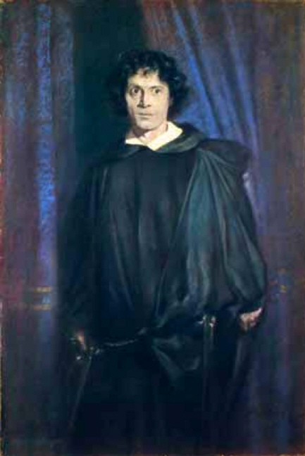 Portrait Theaterwissenschaftliche Sammlung der Universität zu Köln, Schloss Wahn